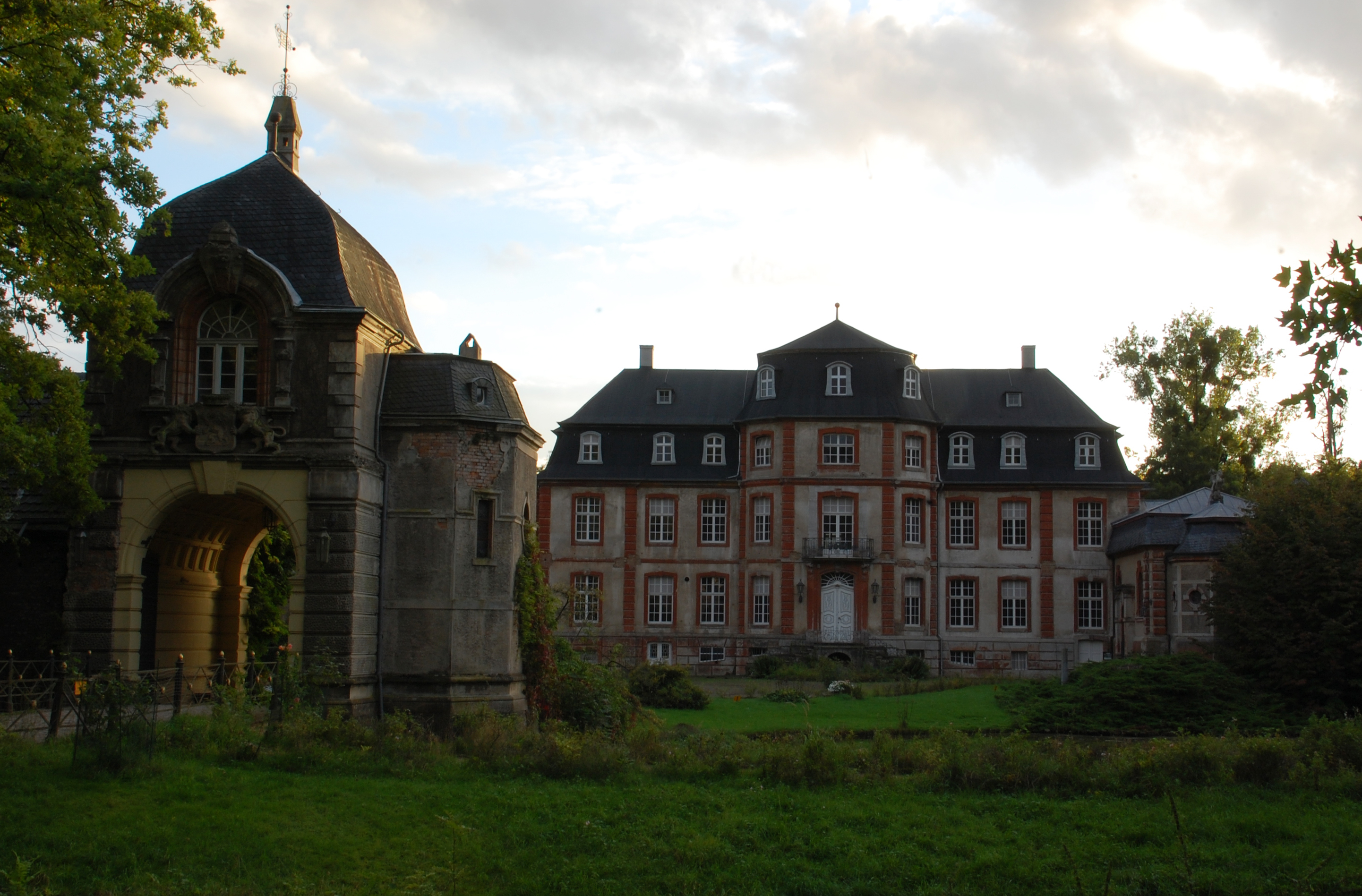 Schloss Türnich, Kerpen